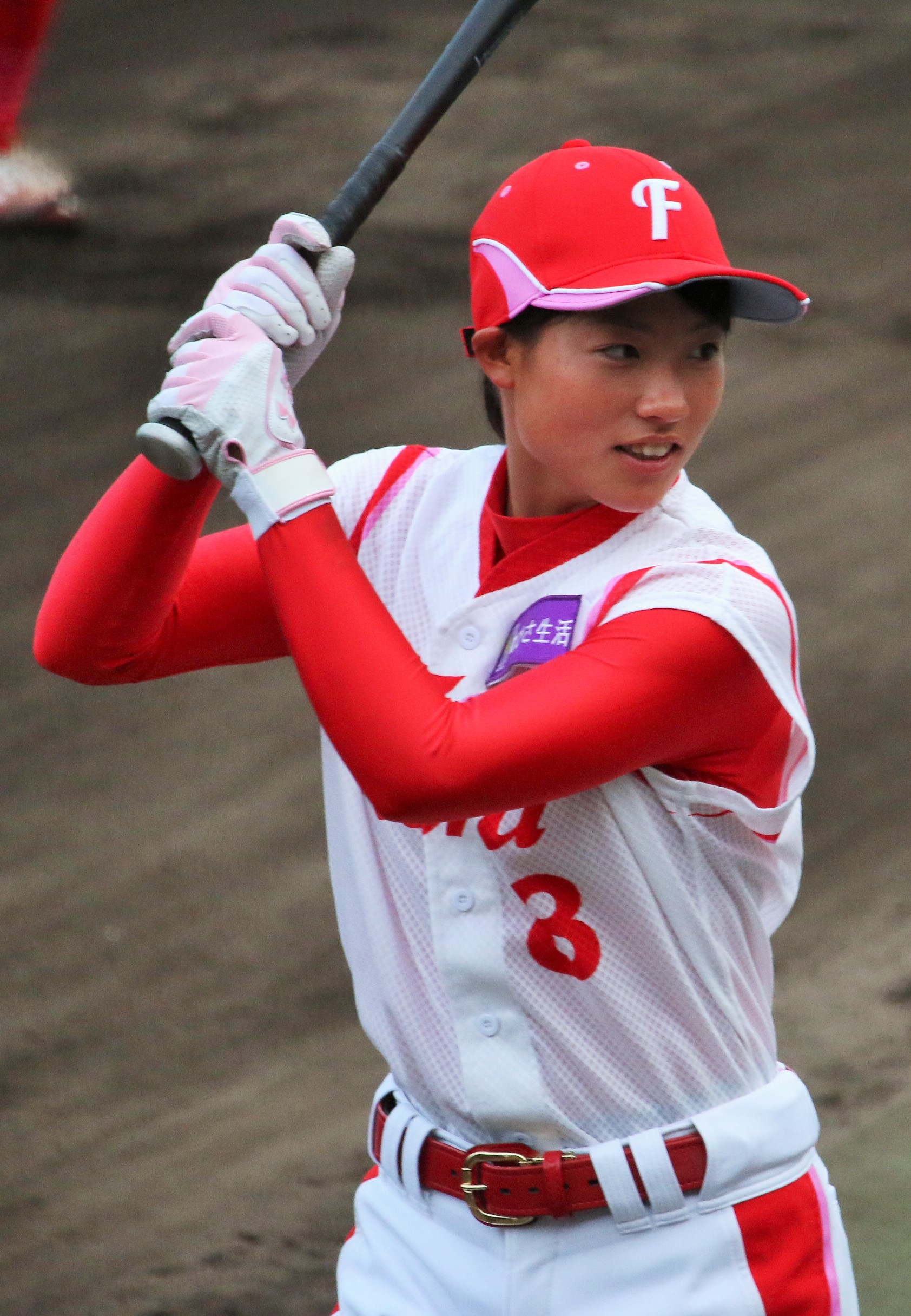 ウエスト・フローラ内野手の岩田きく。わかさスタジアム京都にて。